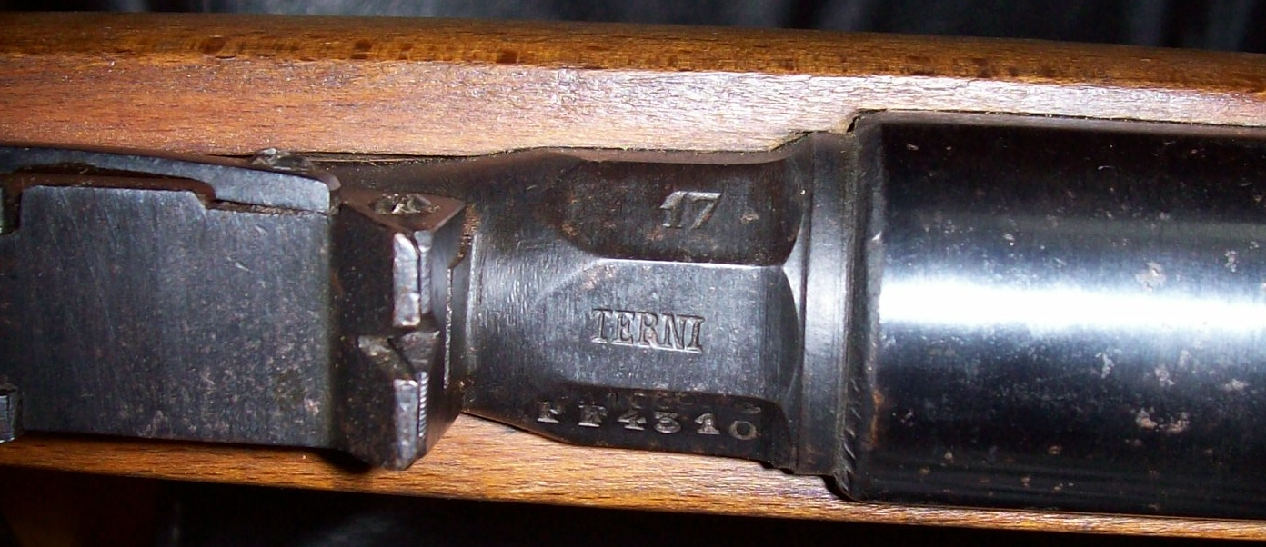 Herstellerbezeichnung und -jahr eines Carcanogewehr